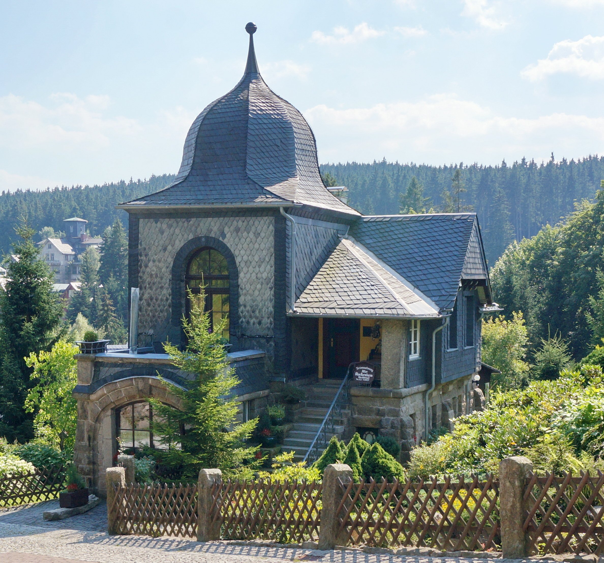 Der Alte Glockenturm, seit dem Bau der neuen Kirche in Privatbesitz, ist heute eine Ferienwohnung. Das Gebäude ist ein Kulturdenkmal der Stadt Wernigerode, Ortsteil Schierke, mit der Erfassungsnummer 094 56092.